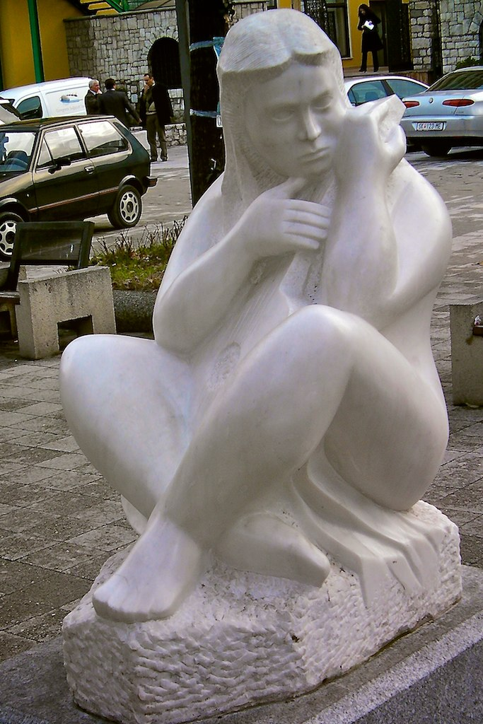 Statue in Skopje, Macedonia